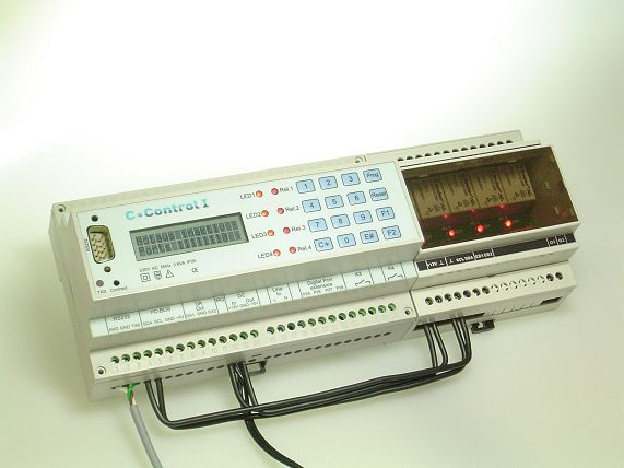 C-Control I Station 2 im Einsatz mit einer Hutschienen Relais-Box. Die Ansteuerung der Relaisbox erfolgt hier über den I²C-Bus. Quelle: Selbst fotografiert